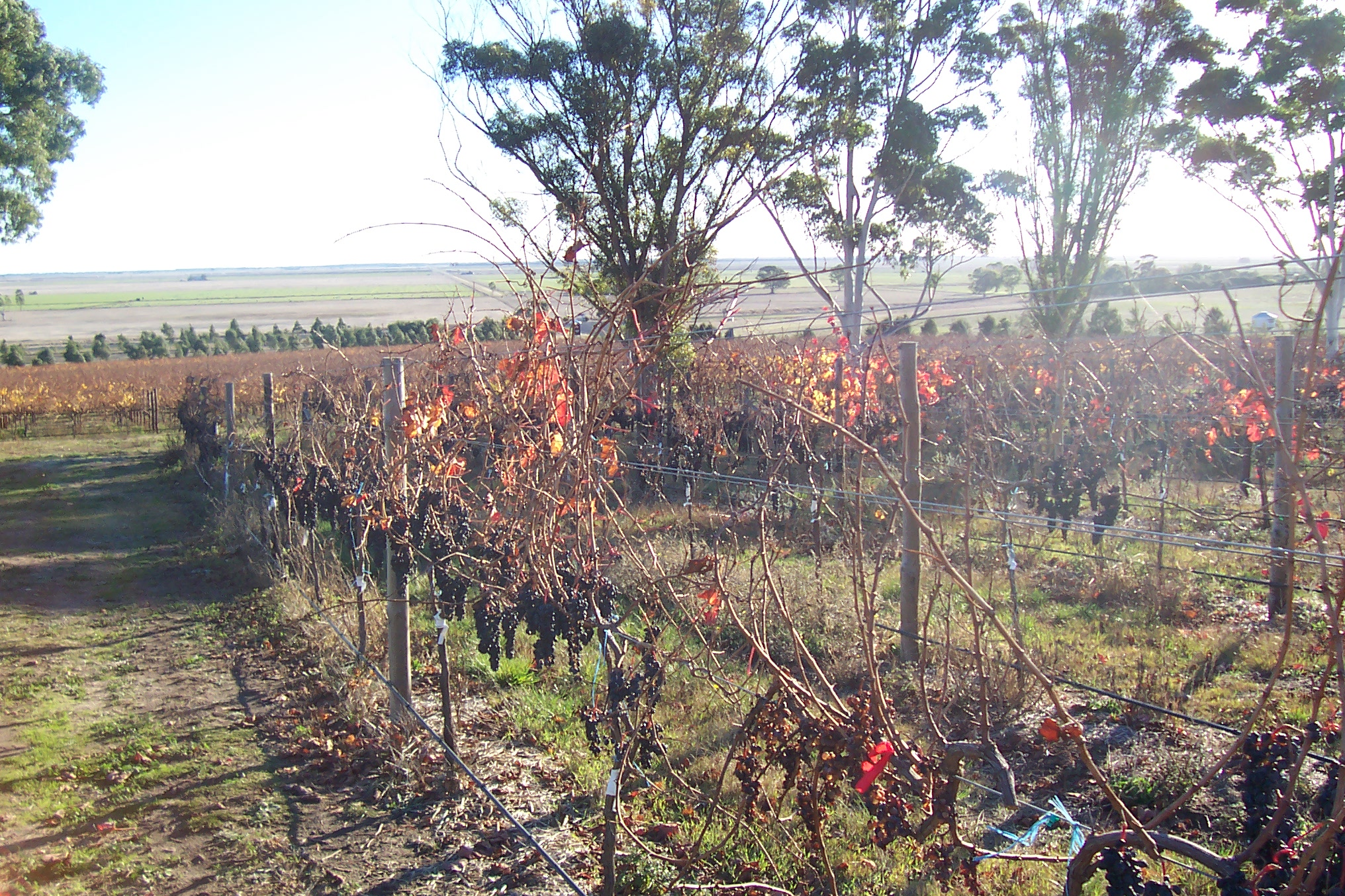 Vines near Russet Ridge Winery